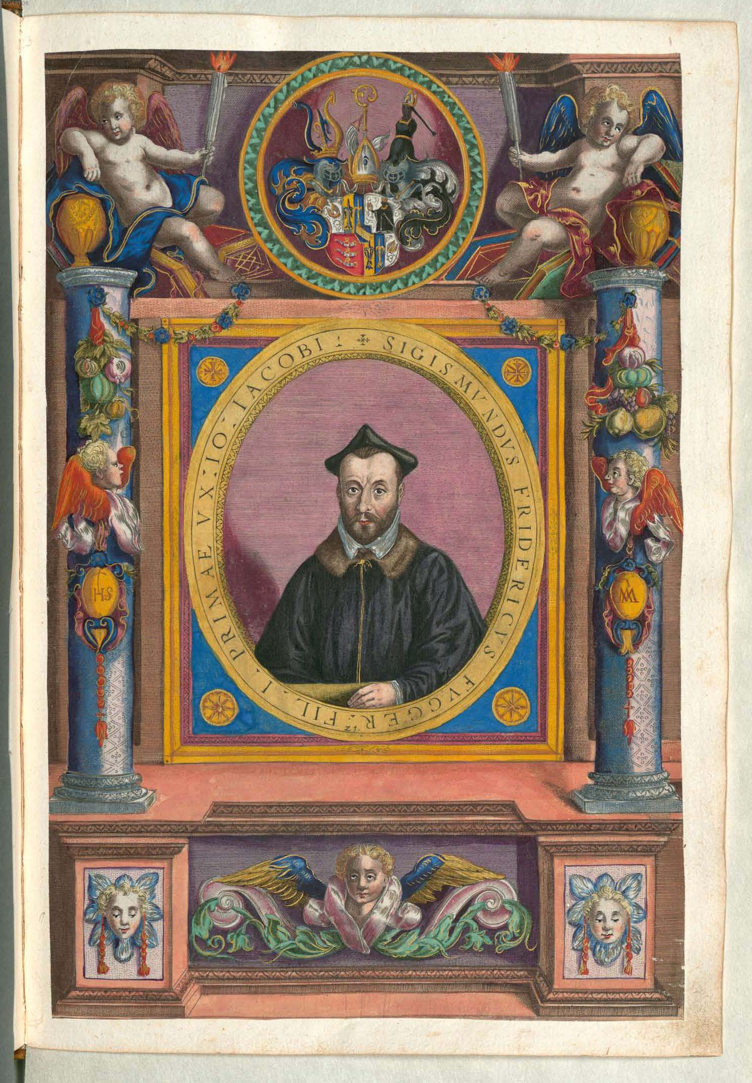 Fuggerorum et Fuggerarum imagines wurde 1588 von Philipp Eduard Fugger beim Kupferstecher Dominicus Custos in Auftrag gegeben. Das Werk enthält mit Aquarell- und Gouache-Farbe kolorierte Stiche der Mitglieder der Fugger von der Lilie. Der Druck von 1618 stellt das einzige kolorierte Exemplar dar. Sigmund Friedrich, Freiherr Fugger (1542-1600), Bischof von Regensburg, Sohn des Johann Jakob, Freiherr Fugger (1516-1575)